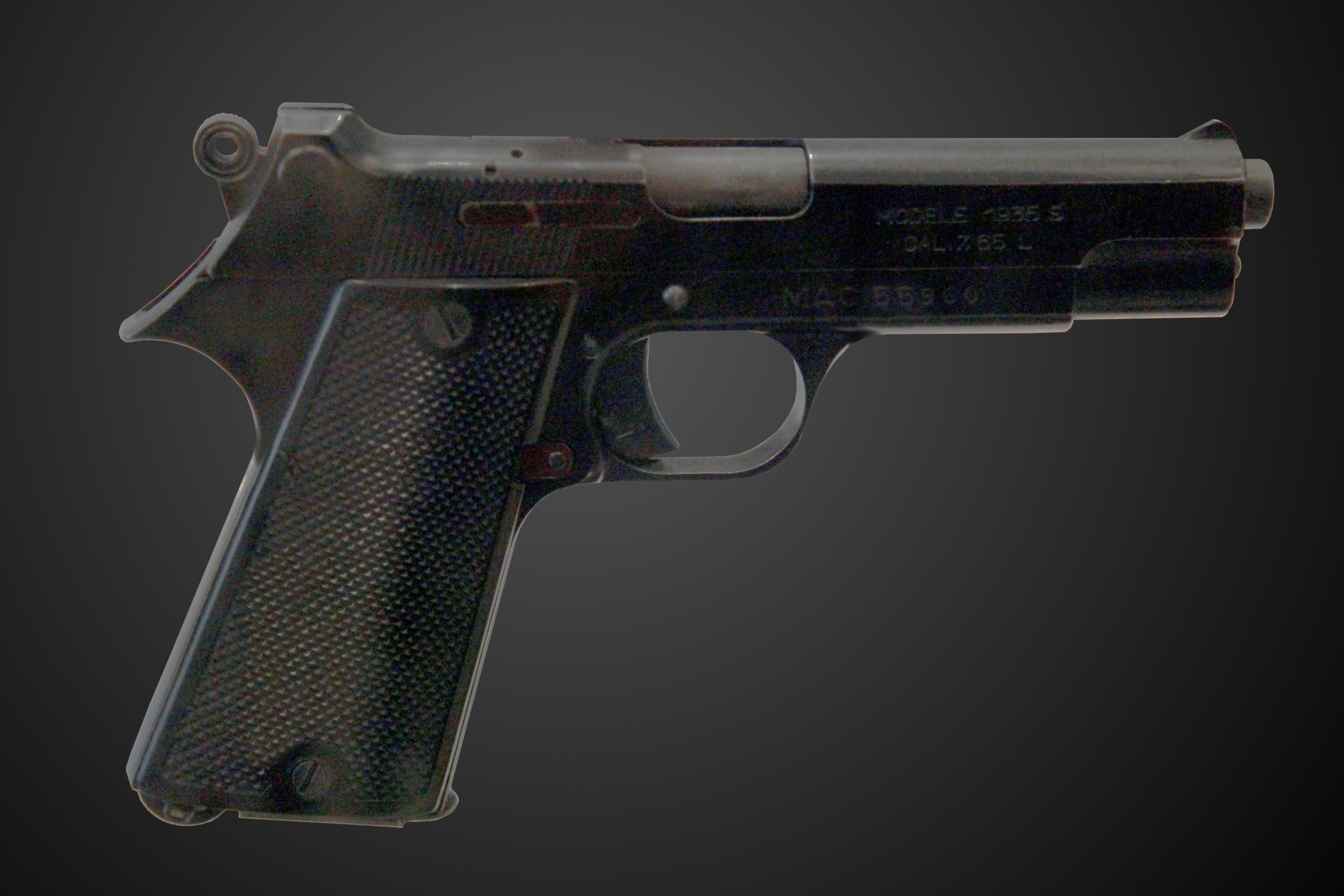 Pistolet automatique modèle 1935 S on display at Musée de l'Armée